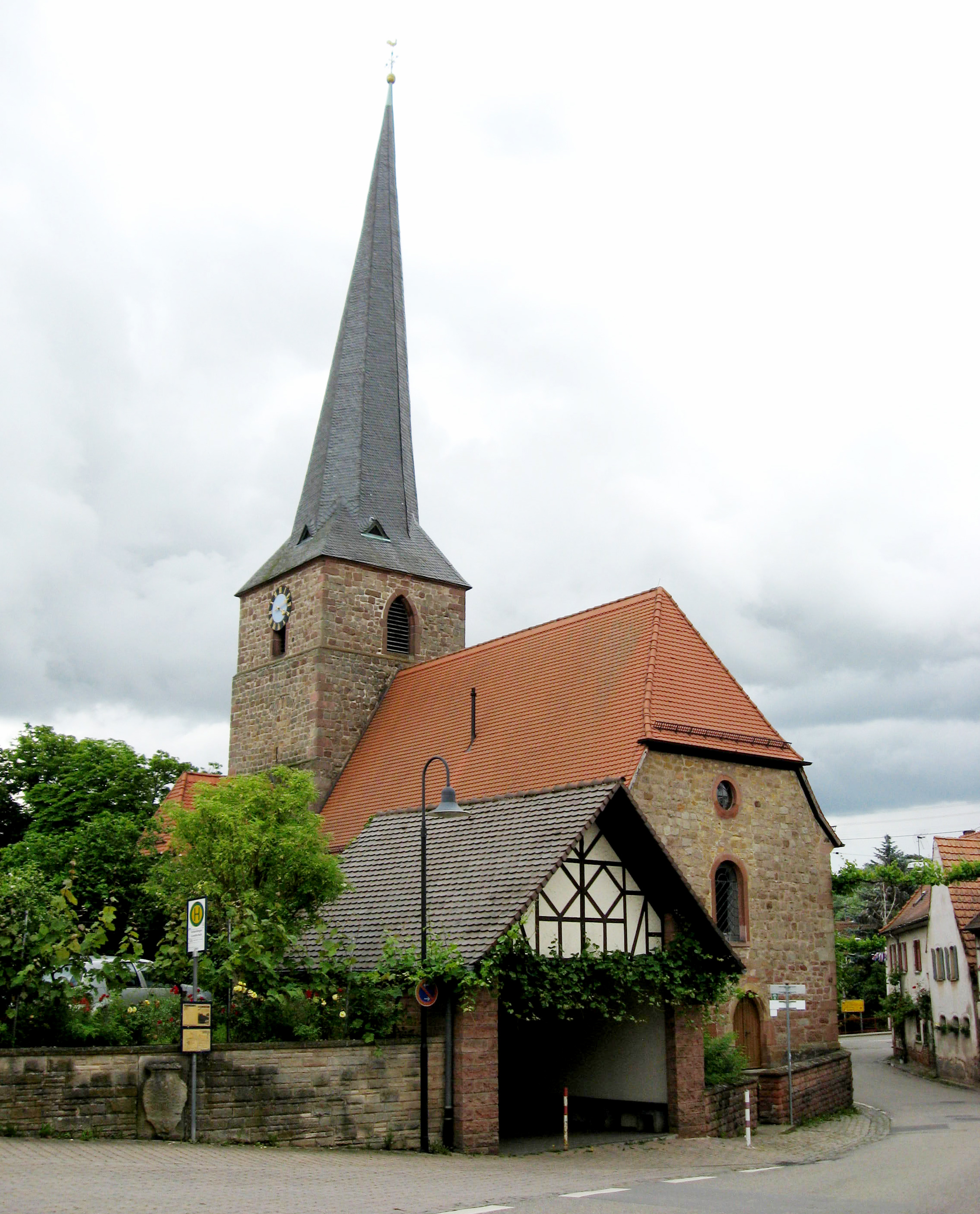 Simultankirche St. Quintinus in Siebeldingen von Nordwesten; deutlich zu erkennen ist der Schiefe Turm